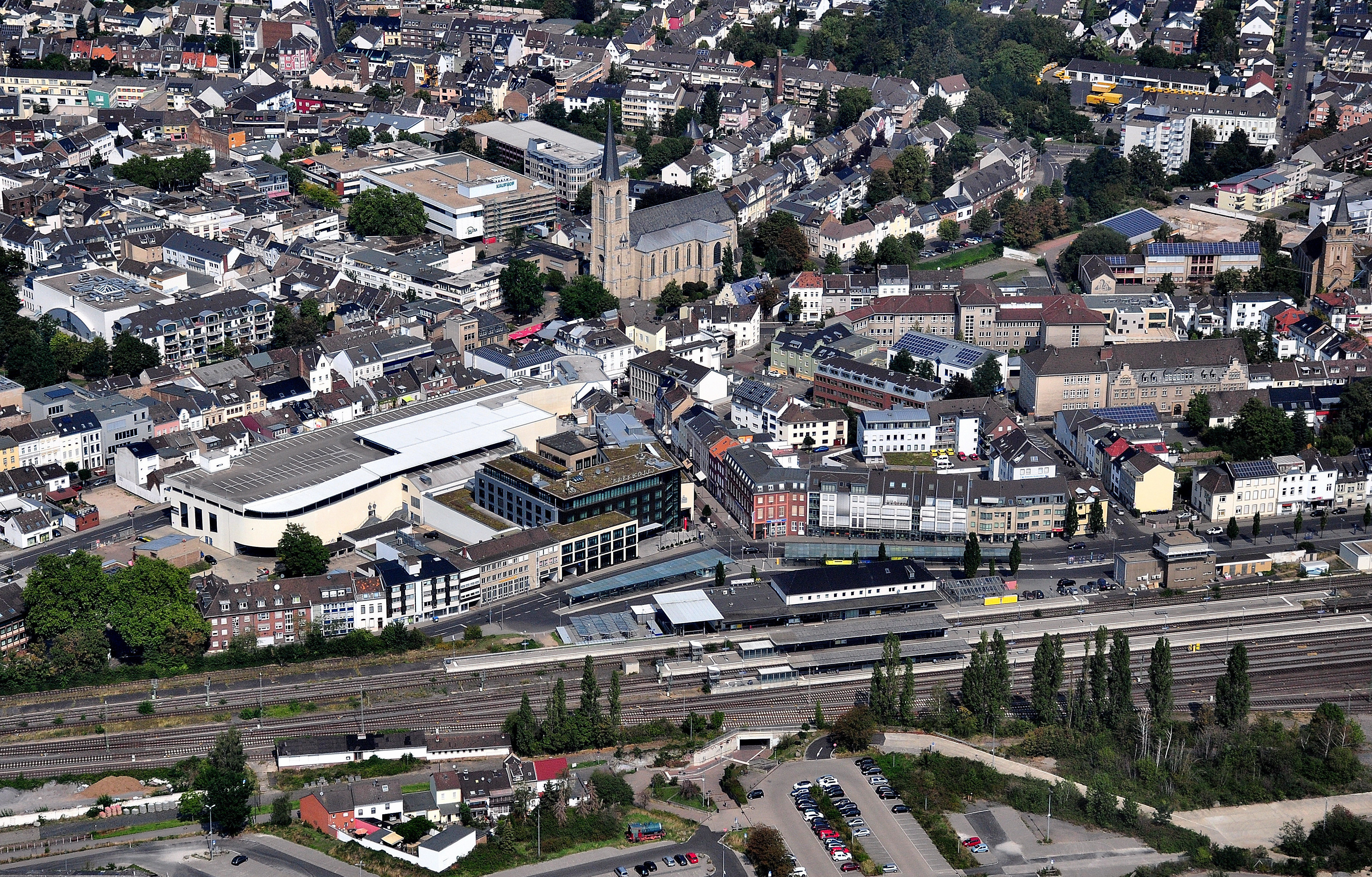 Euskirchen – Blick vom Bahnhof in nördliche Richtung